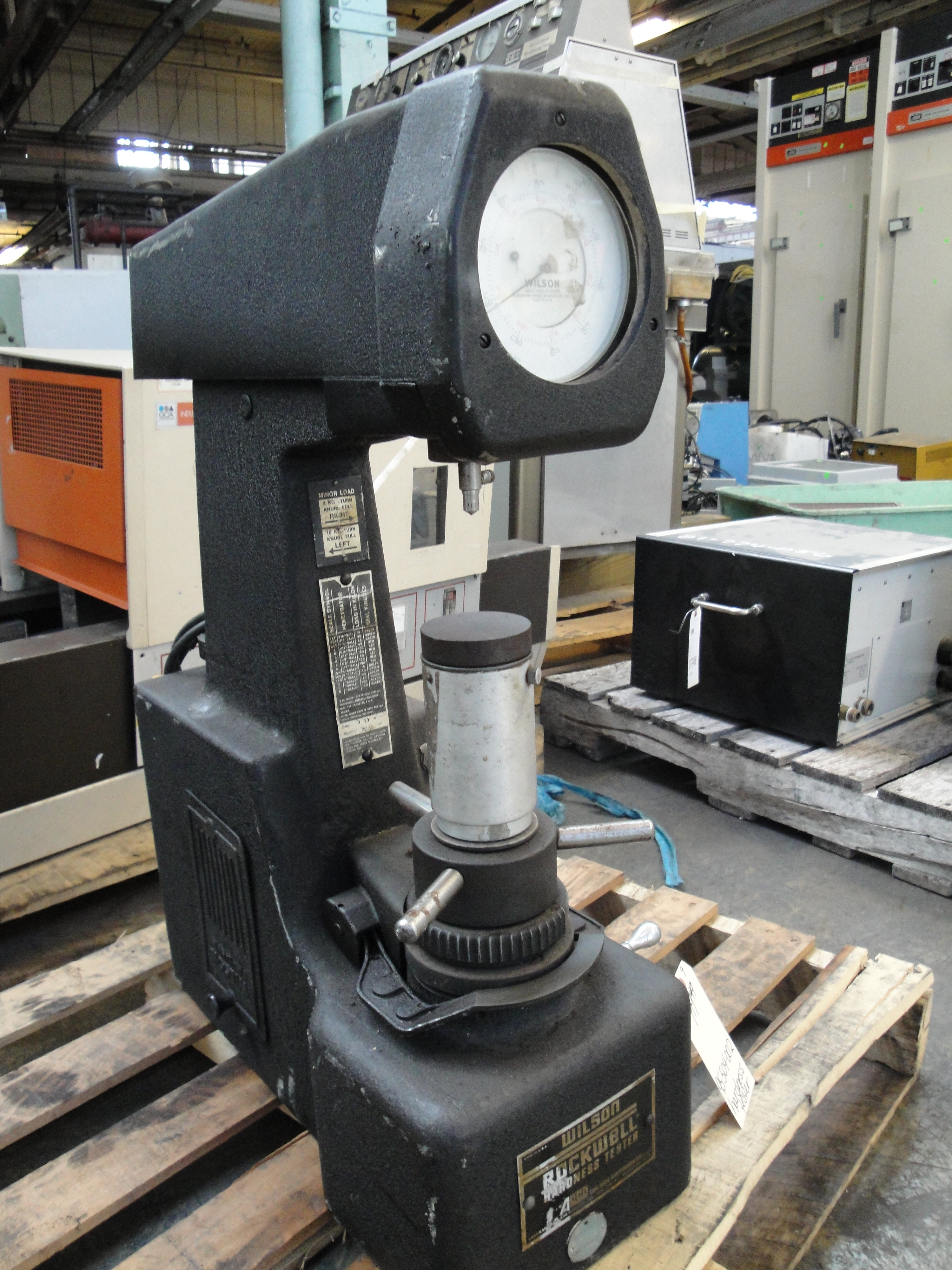 A Rockwell Hardness tester.